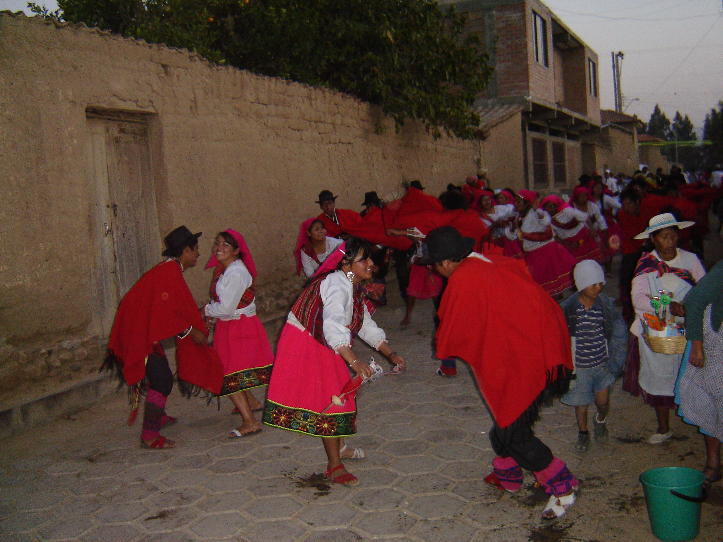 Runa Simi: Muyu muyu tusuy qutu, Wallpama yachaywasi yachachipkuna chantakunankupaq wasimanta, Challwamayu markapi, Wak'as sapsipi, Wuliwya suyupi.